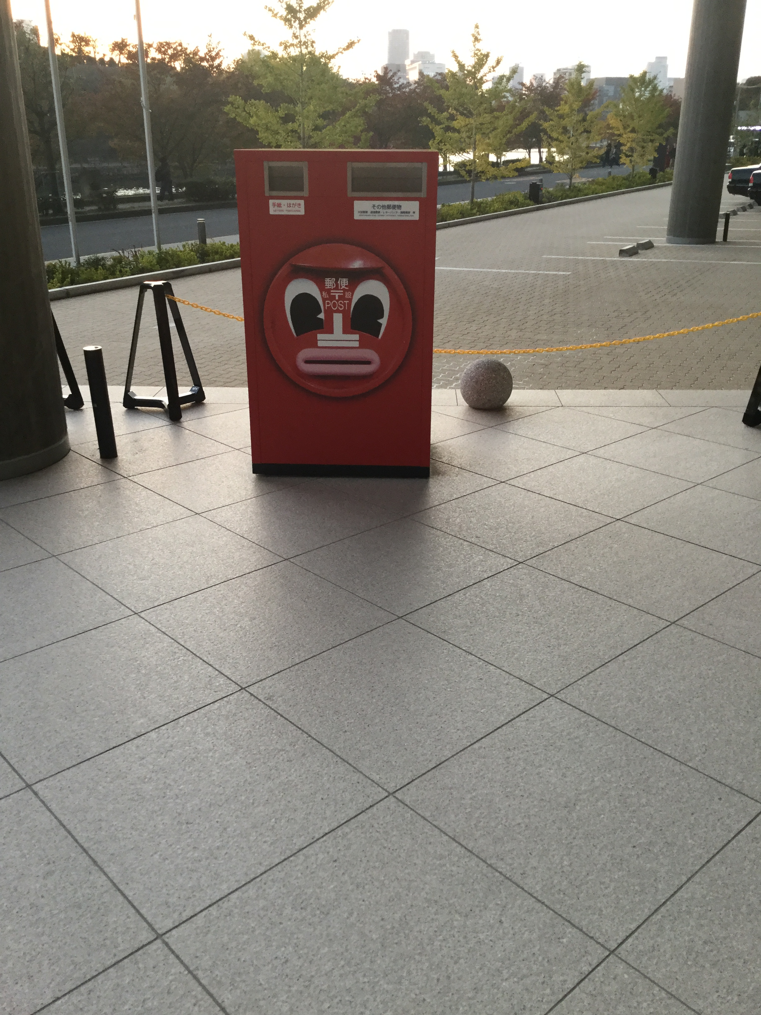 読売テレビ本社にあるトスポがの顔が描かれたポスト